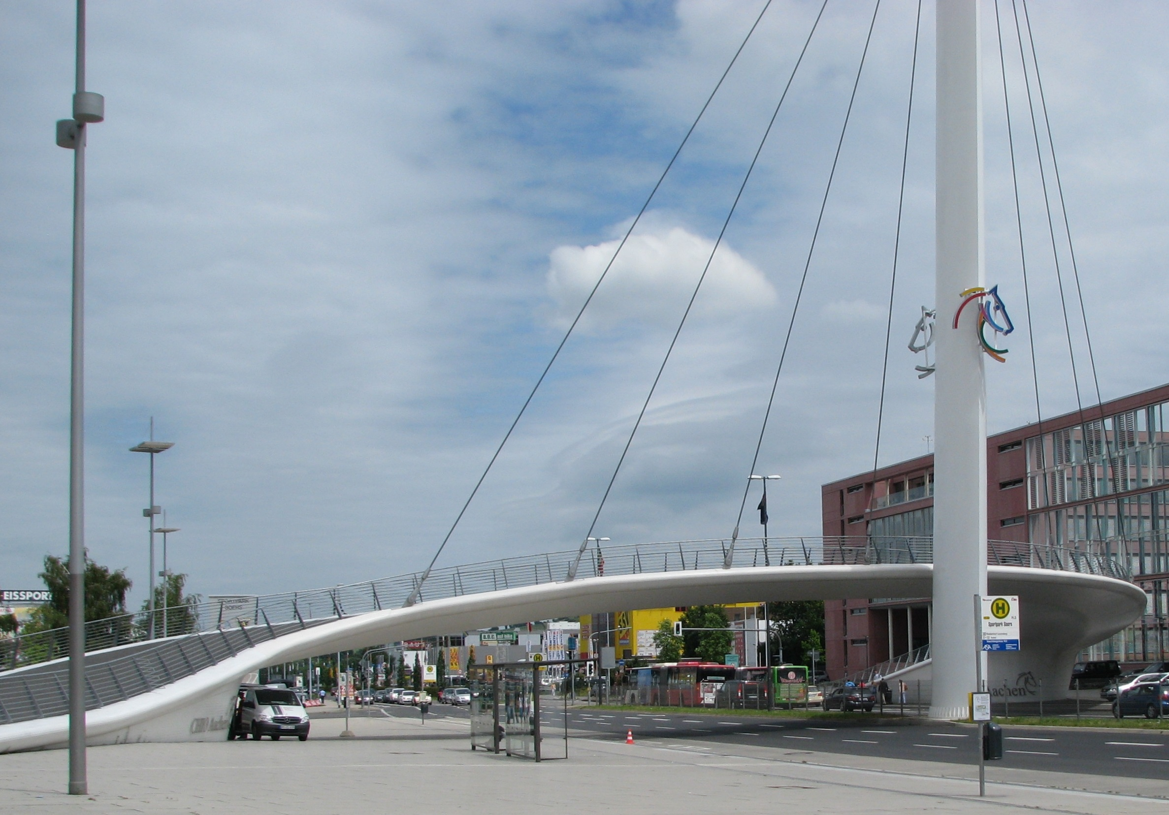 CHIO-Brücke über die Krefelder Straße (B57) zwischen Tivoli und Finanzamt am Sportpark Soers in Aachen.